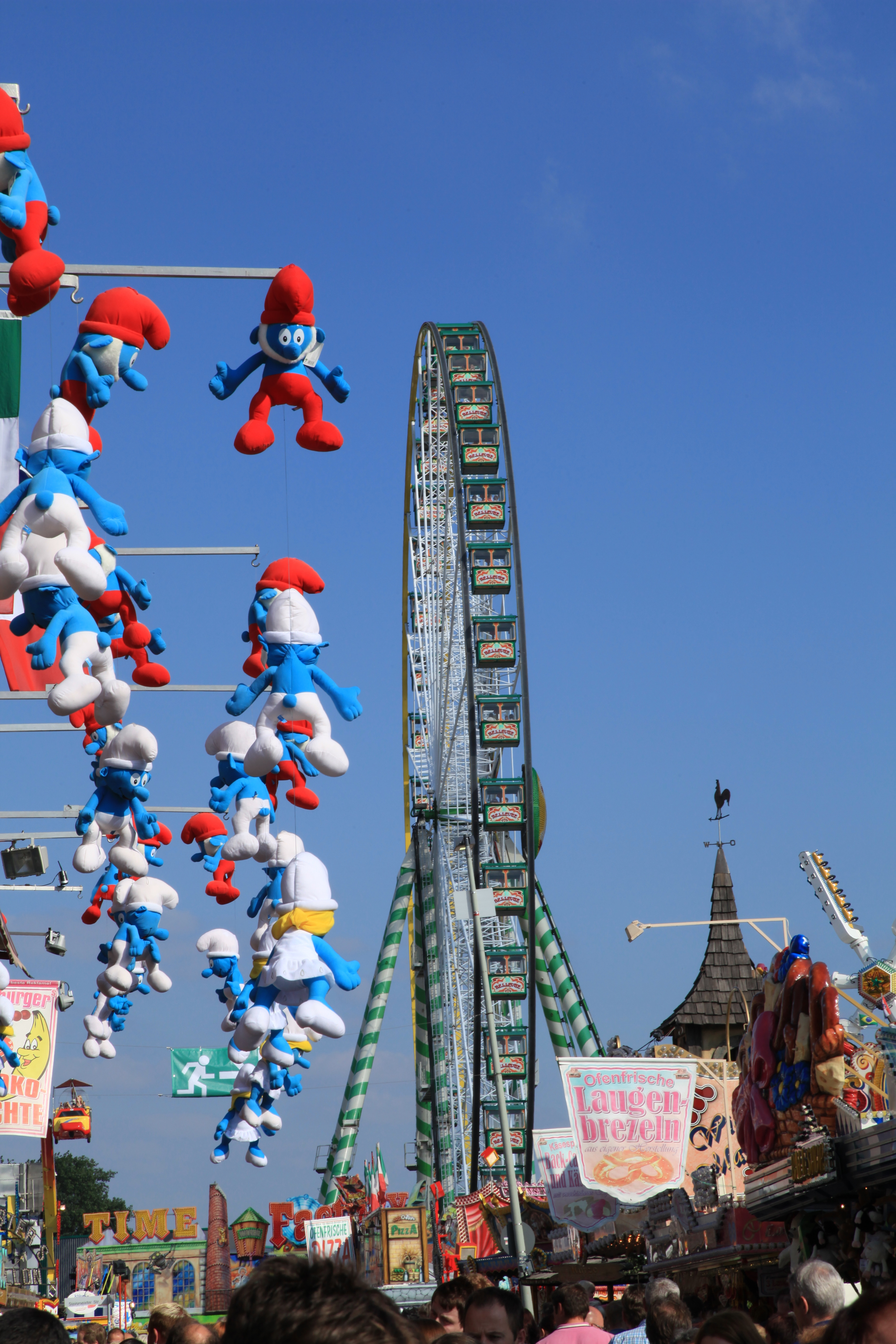 Cranger Kirmes 2012 in Herne-Crange